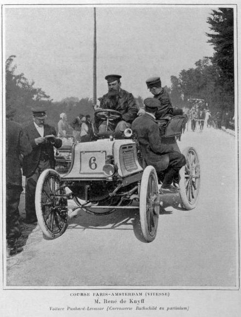 Départ de Paris-Amsterdam-Paris 1898, René de Knyff.